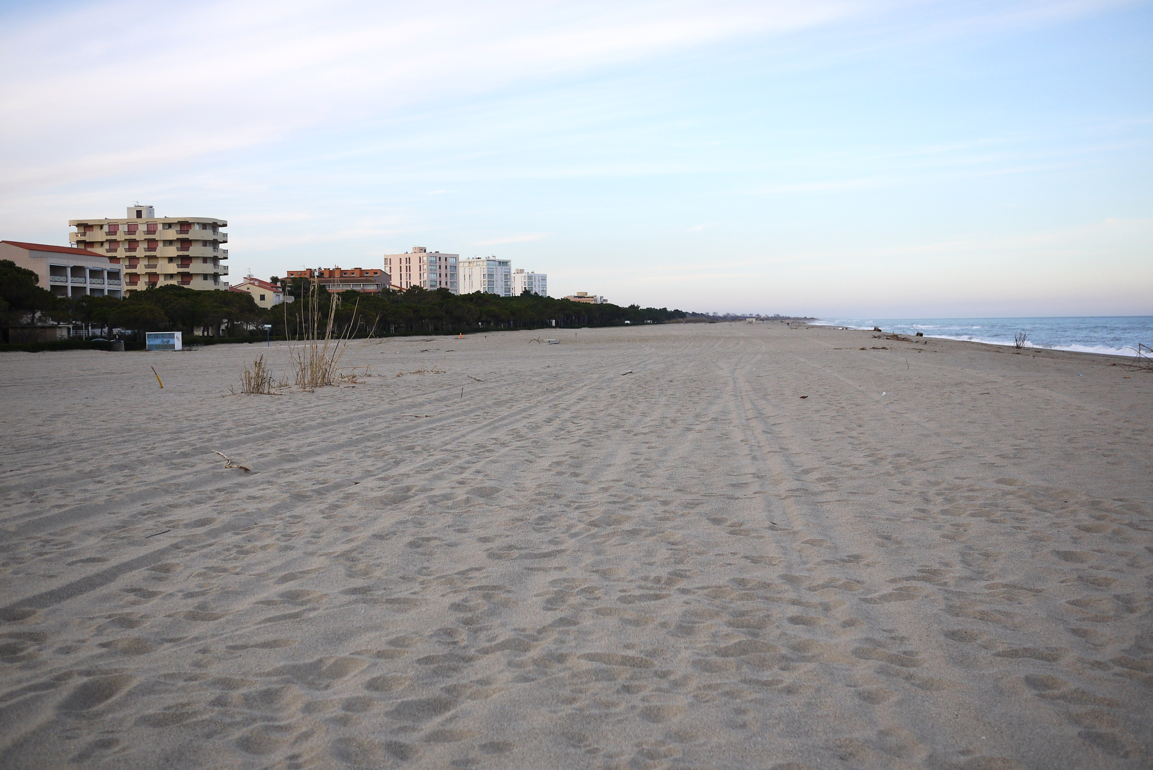 La Plage des Pins au mois de décembre. La foule des vacanciers est partie depuis bien longtemps... Argelès-Plage, Pyrénées-Orientales, France. Argeles